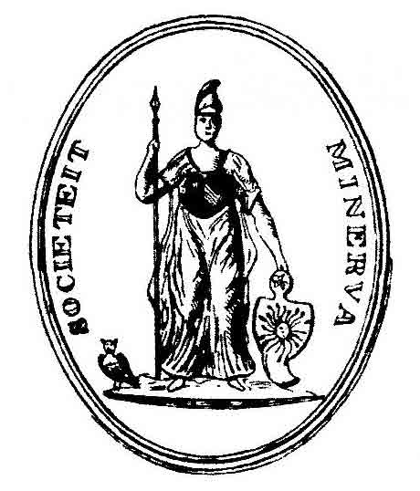 Sigillum maior Sociëteit Minerva